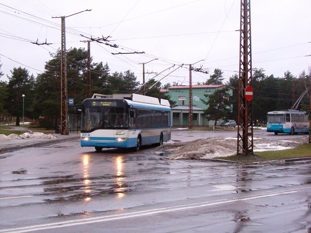 Trolliliini lõppjaama dispetšerihoone. Männipark, Mustamäe. Tallinn.